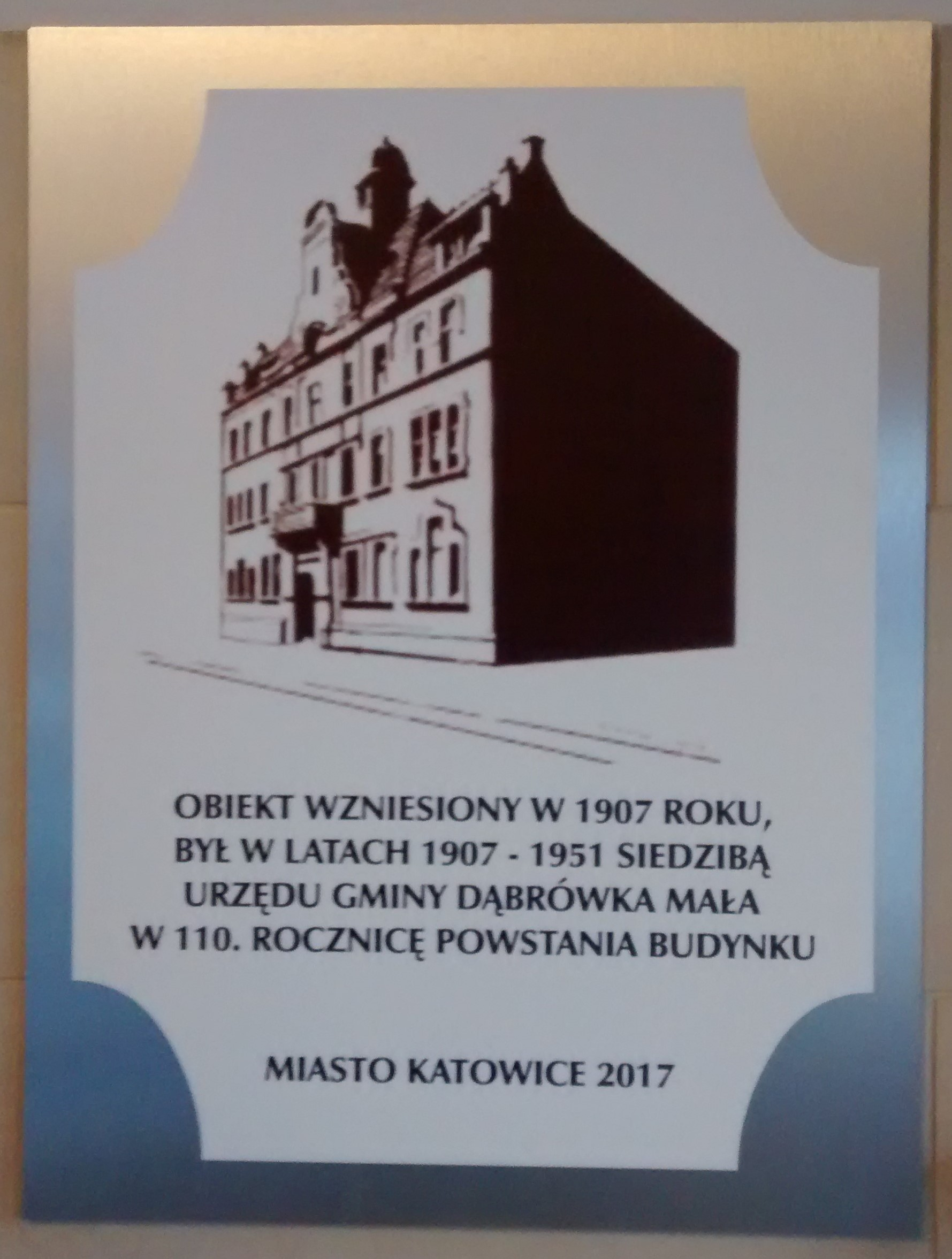 Tablica pamiątkowa w budynku dawnego ratusza przy ul. gen. H. Le Ronda 16 w dzielnicy Dąbrówka Mała w Katowicach